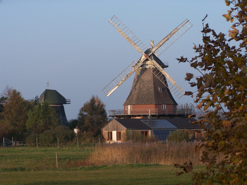 Windmühlen in Elmenhorst/Lichtenhagen; Lido-Mühle (hinten/links) und Lichtenhägener Mühle (vorne/rechts)